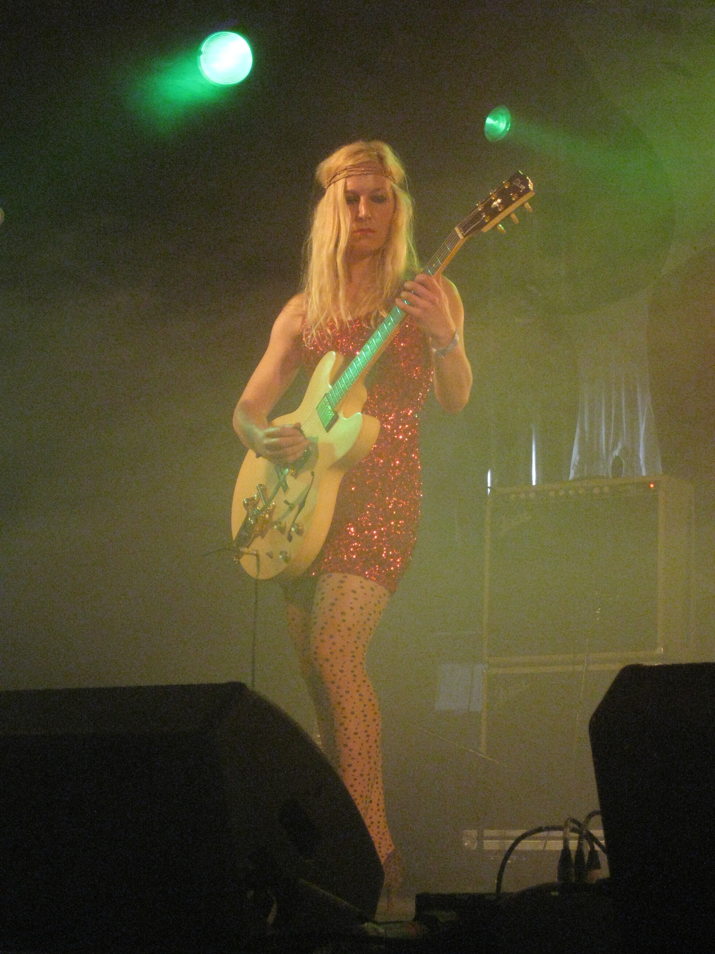 Hedvig Mollestad Thomassen (født 1982) er en norsk gitarist fra Ålesund.